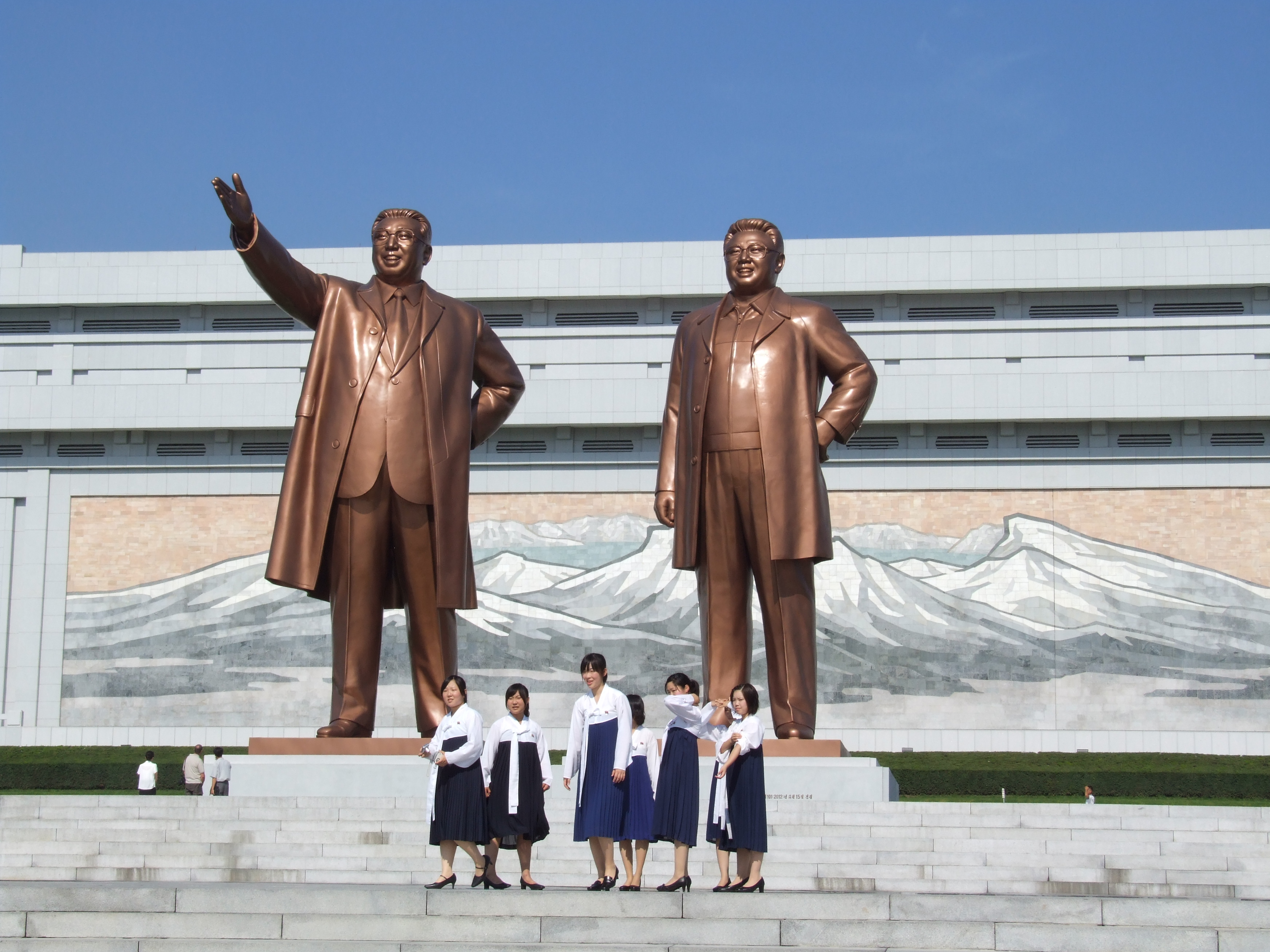 Großmonument Mansudae